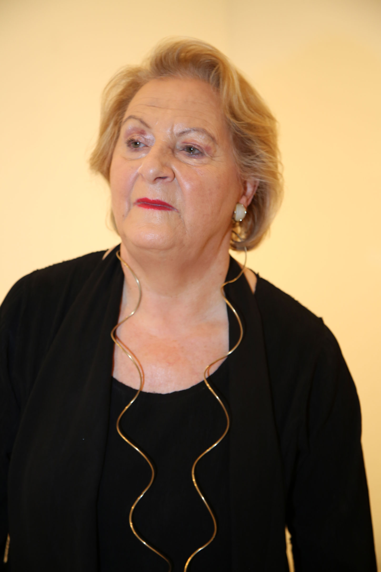 Krinzinger_Ursula-9130